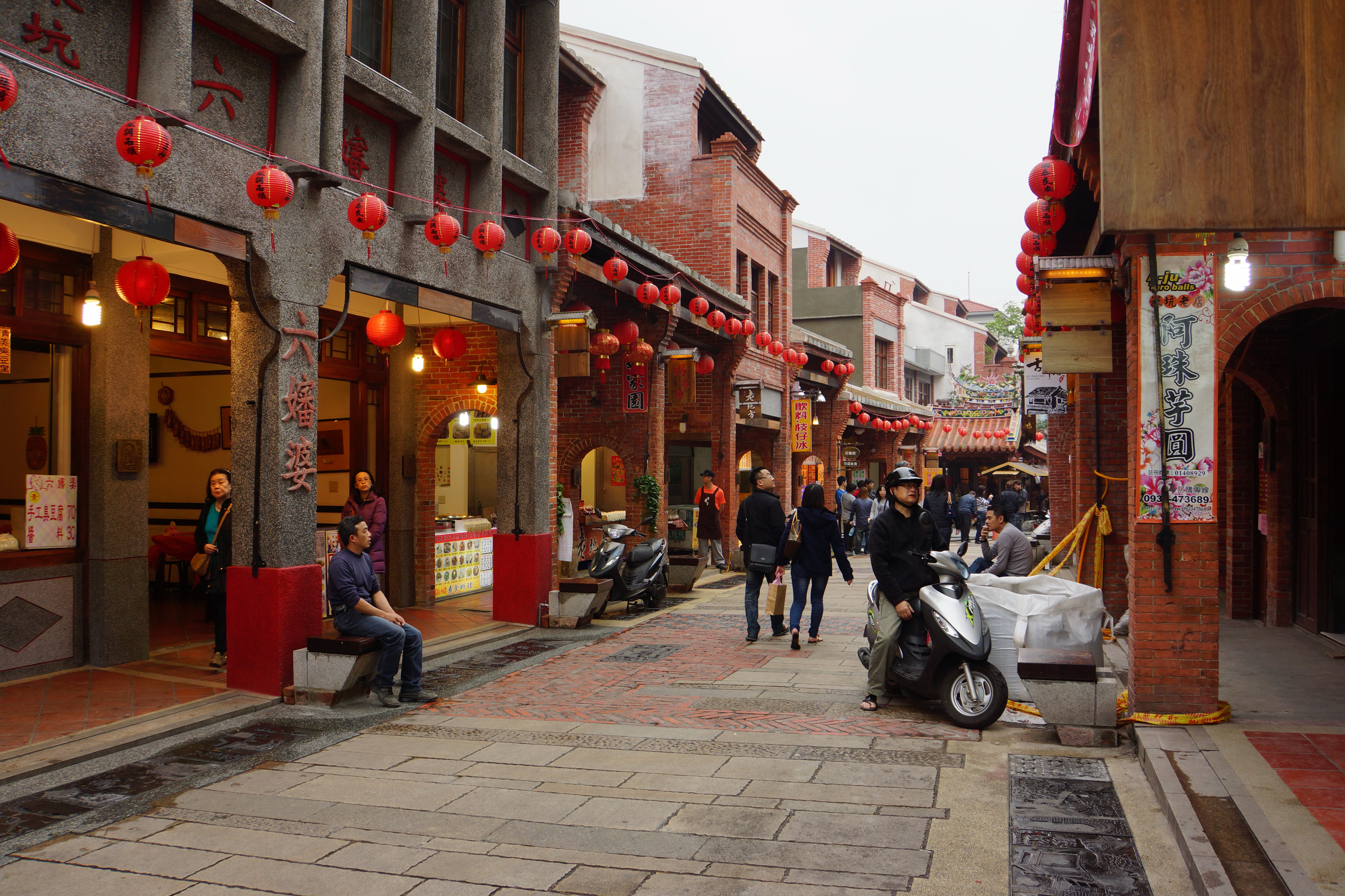 深坑老街 Shenkeng Old Street